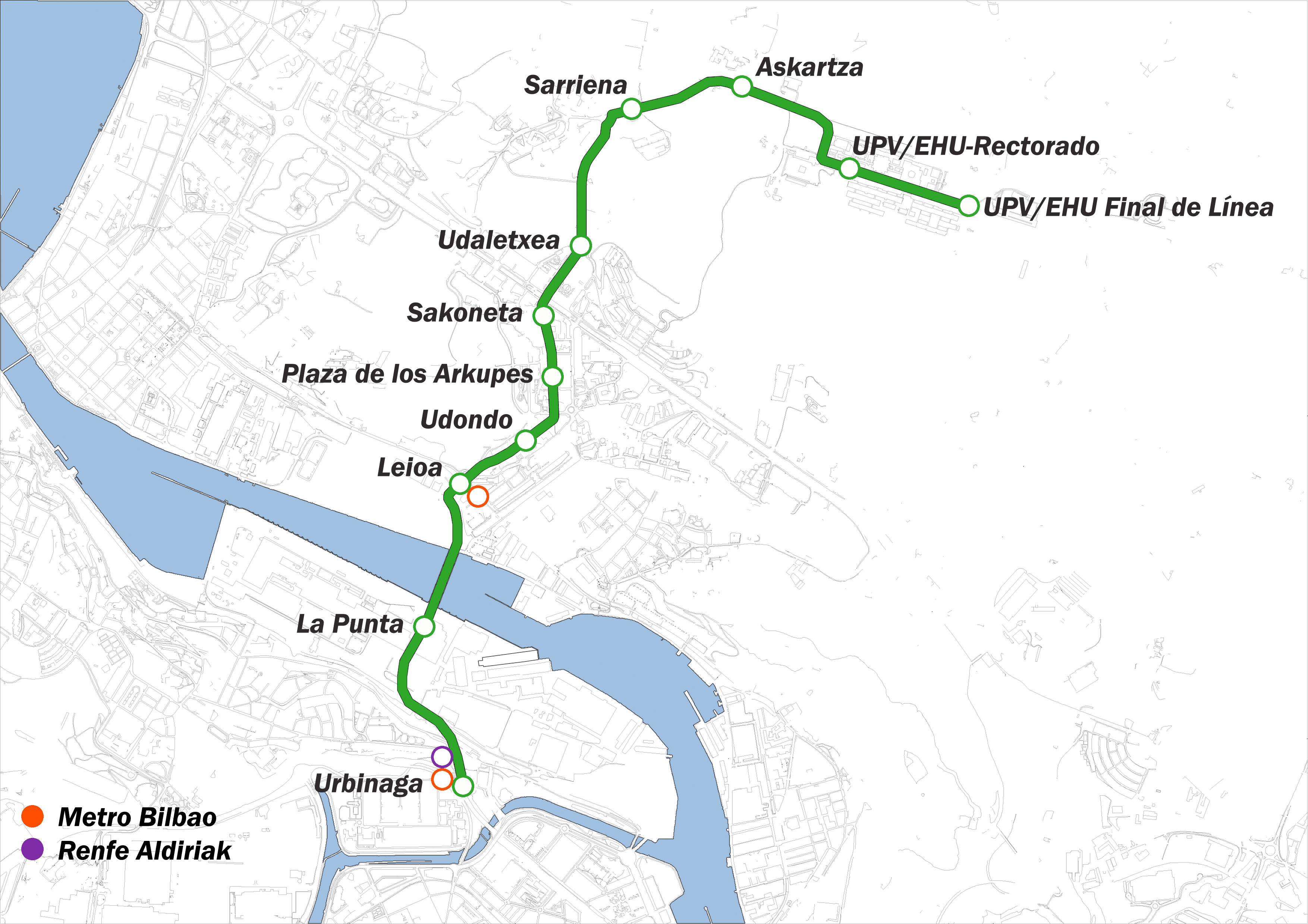 EuskoTranen Planoa Leioa eta Sestaon / Plano de EuskoTran en Leioa y Sestao